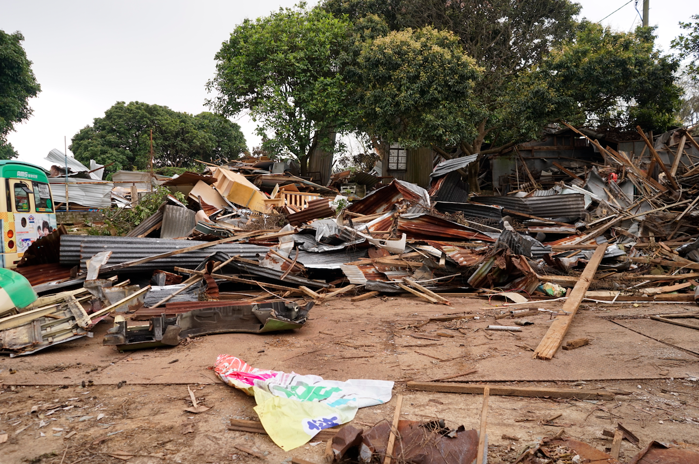 填平後